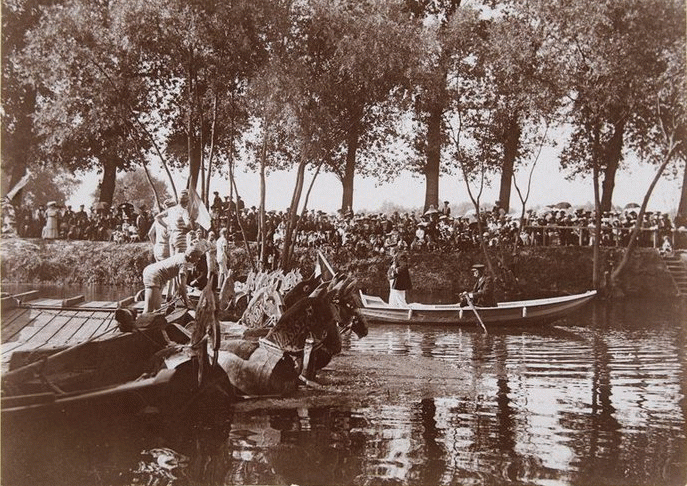 Joute nautique sur le bras de Migneaux (cf. Île de Migneaux, Poissy, France.